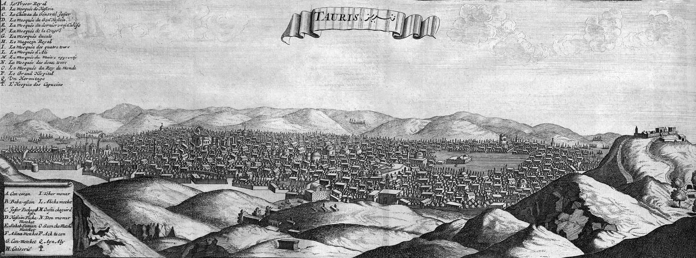 Tauris in 1673